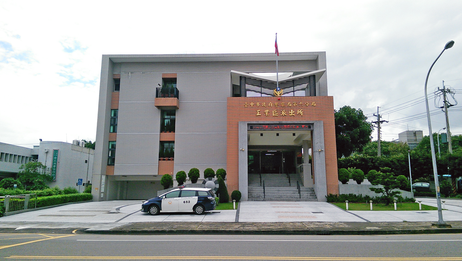 臺中市政府警察局第六分局工業區派出所，地址：臺中市西屯區工業區五路2之1號。